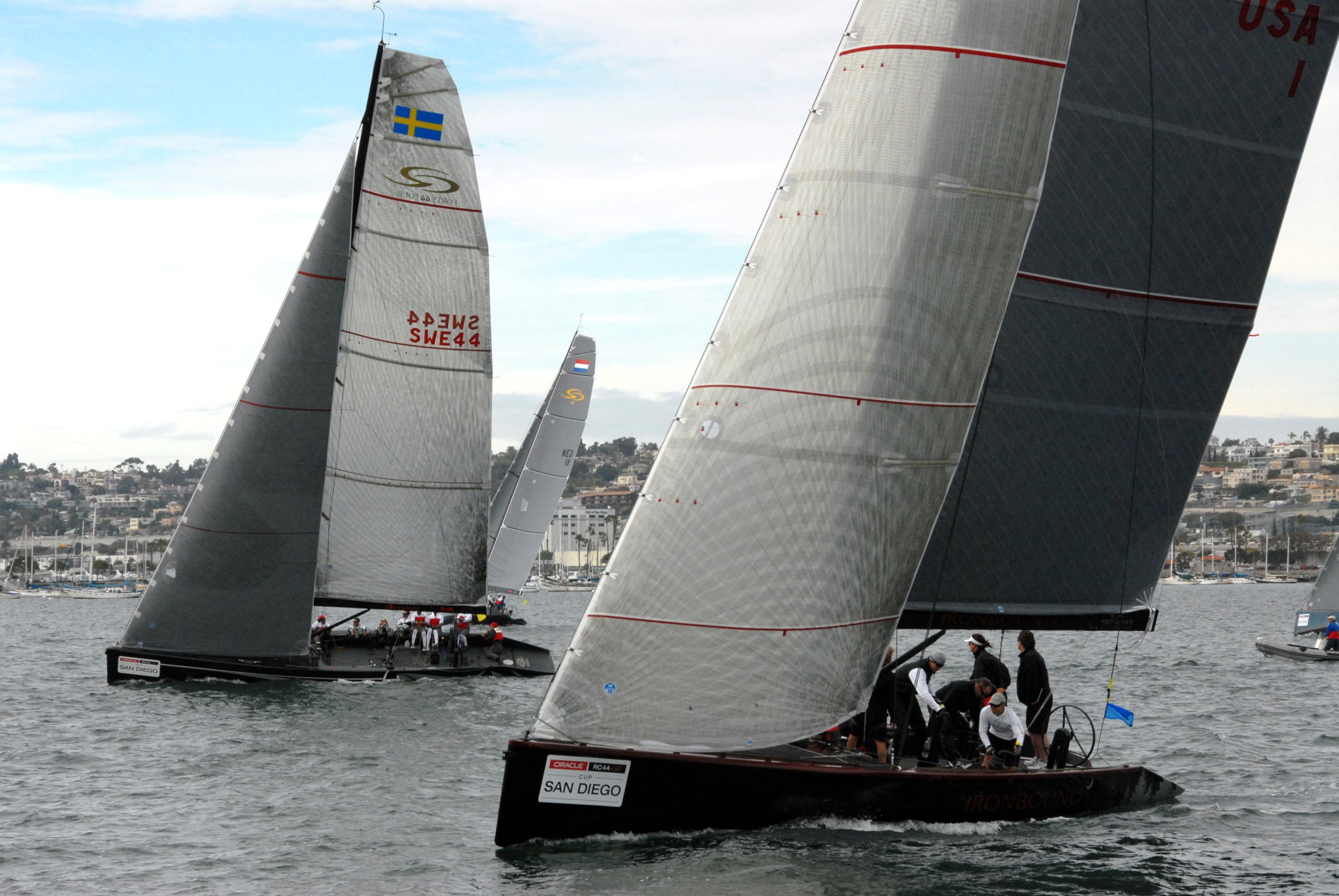 Match racing à San Diego, Californie, sur RC44